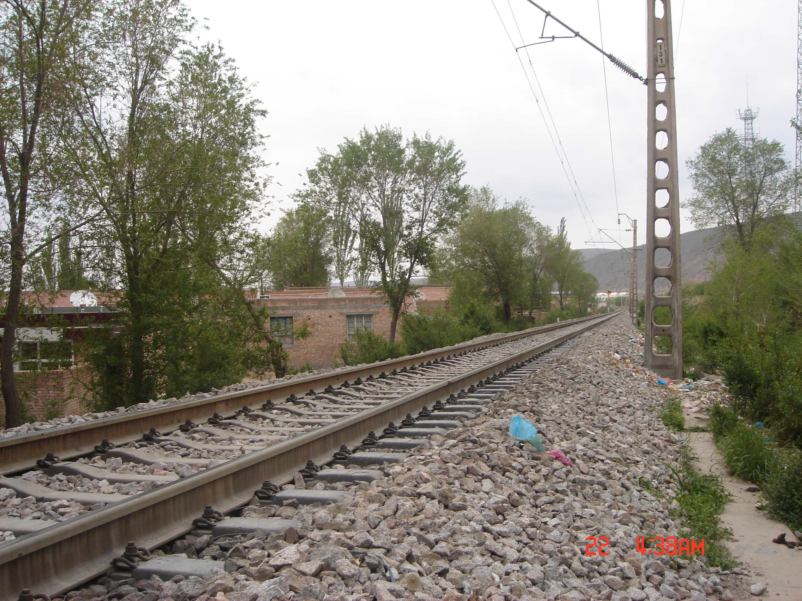 中文（中国大陆）: 宝中铁路跨固原文化路